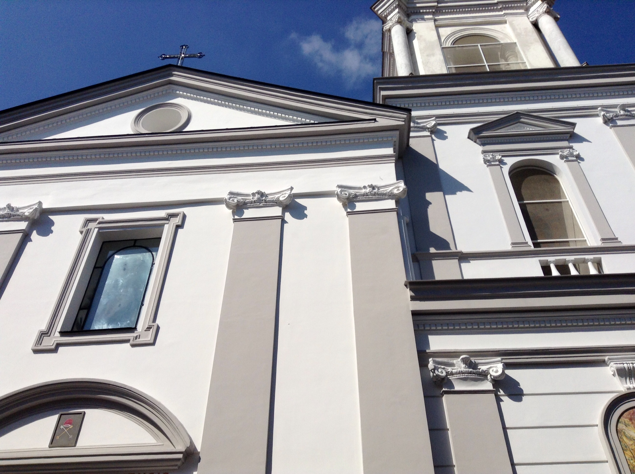 Raffaele Massa, Chiesa di Striano